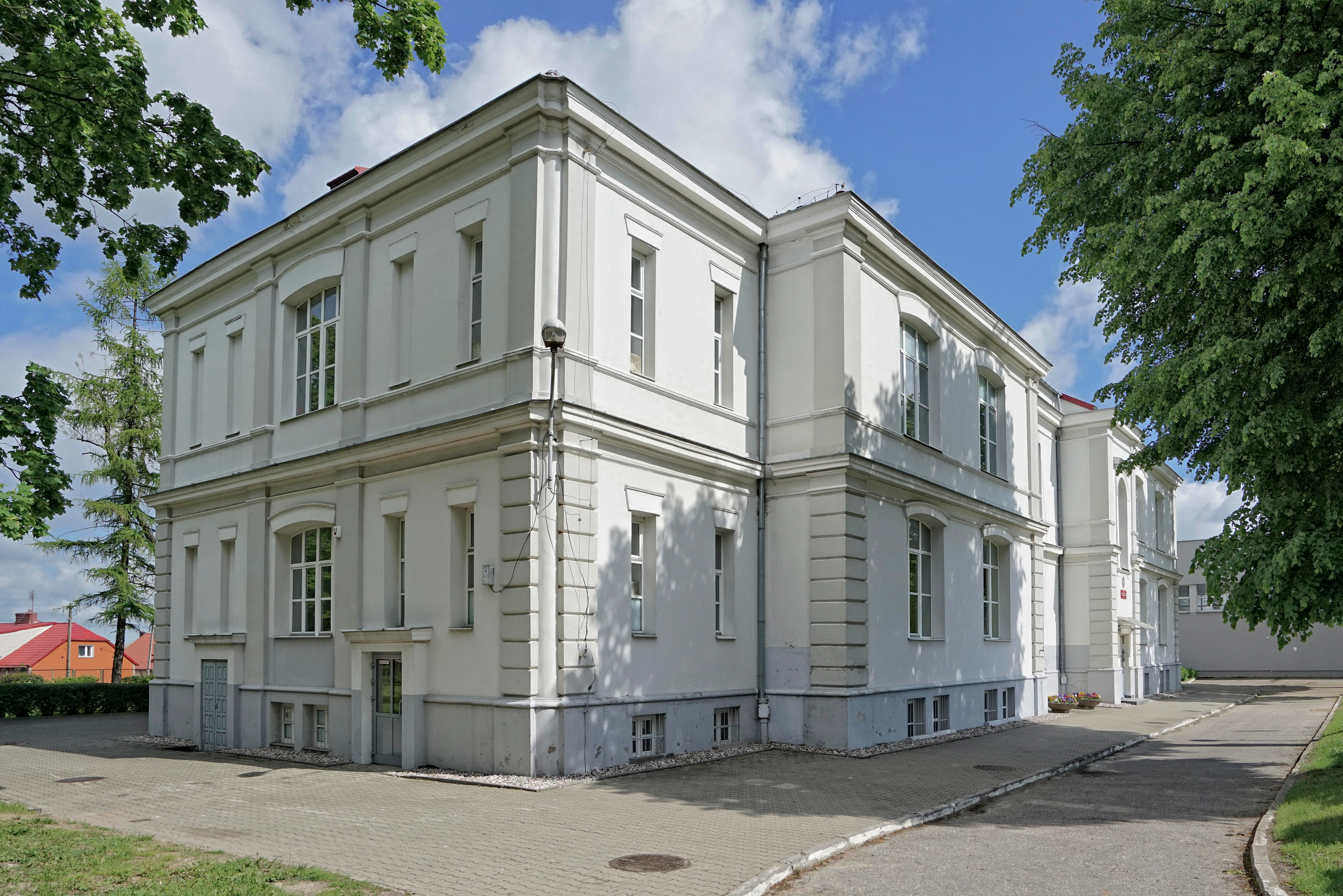 Łomża, Szpital Świętego Ducha w Łomży. Elewacja tylna wschodnia i boczna południowa. Obecnie Akademicka Szkoła Policealna.